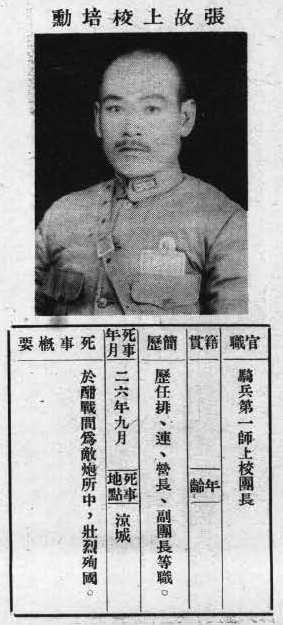 中文（台灣）: 抗戰軍人忠烈錄第一輯中的烈士遺像